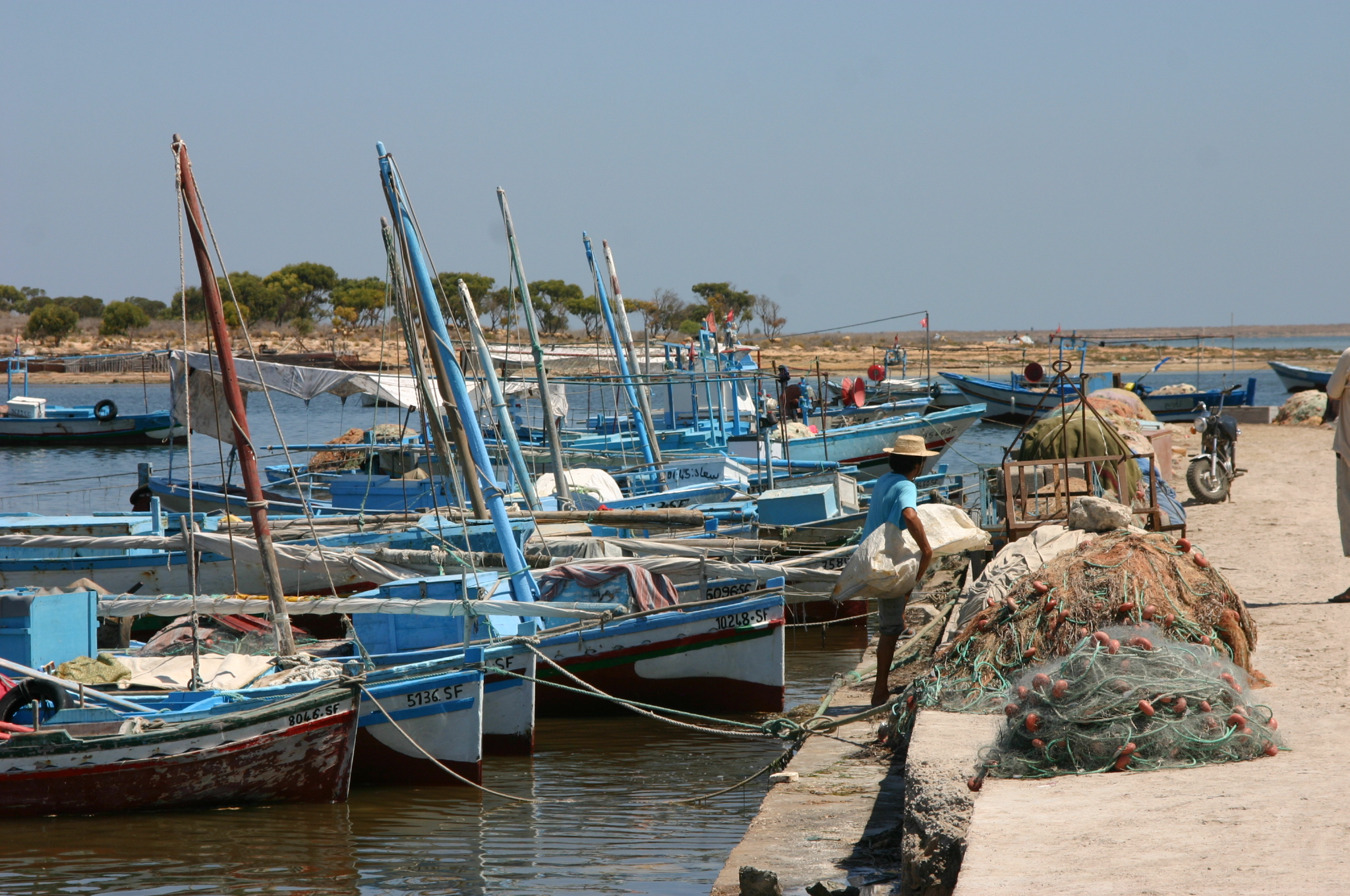 Photo perso août 2007 représentants des bâteaux de pêche au port de Sidi Youssef, îles Kerkennah (Tunisie).